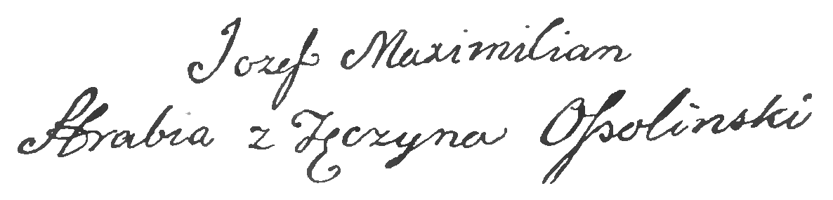 grafika z książki PL "Adam Fischer - Ossolineum"